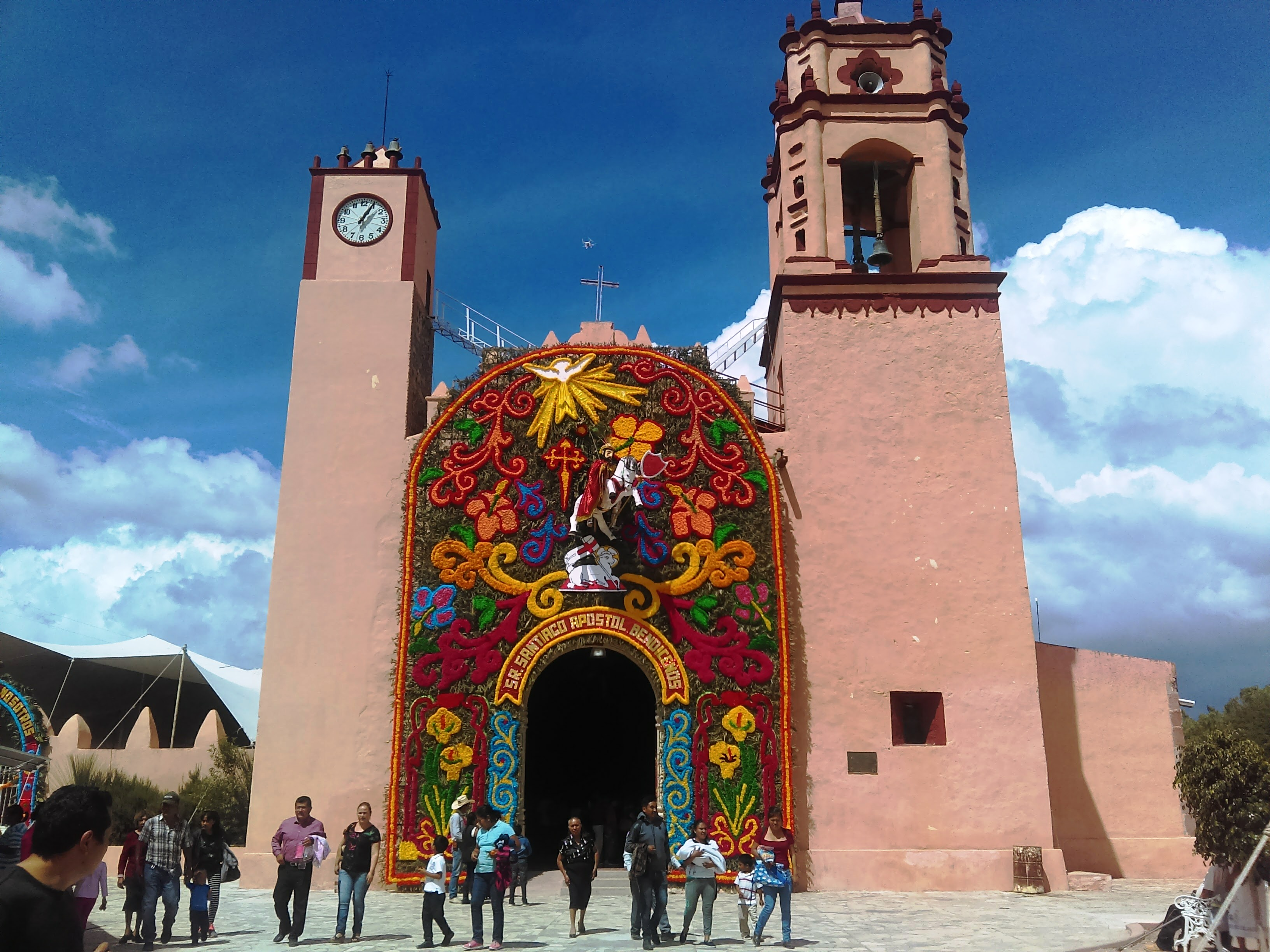 Santiago de Anaya, Hidalgo